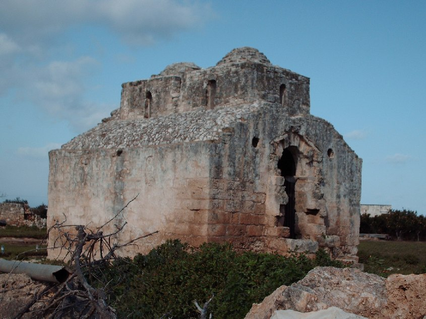 Tempietto di Seppannibale (veduta absidale) - Fasano, Province of Brindisi, Apulia, southern Italy